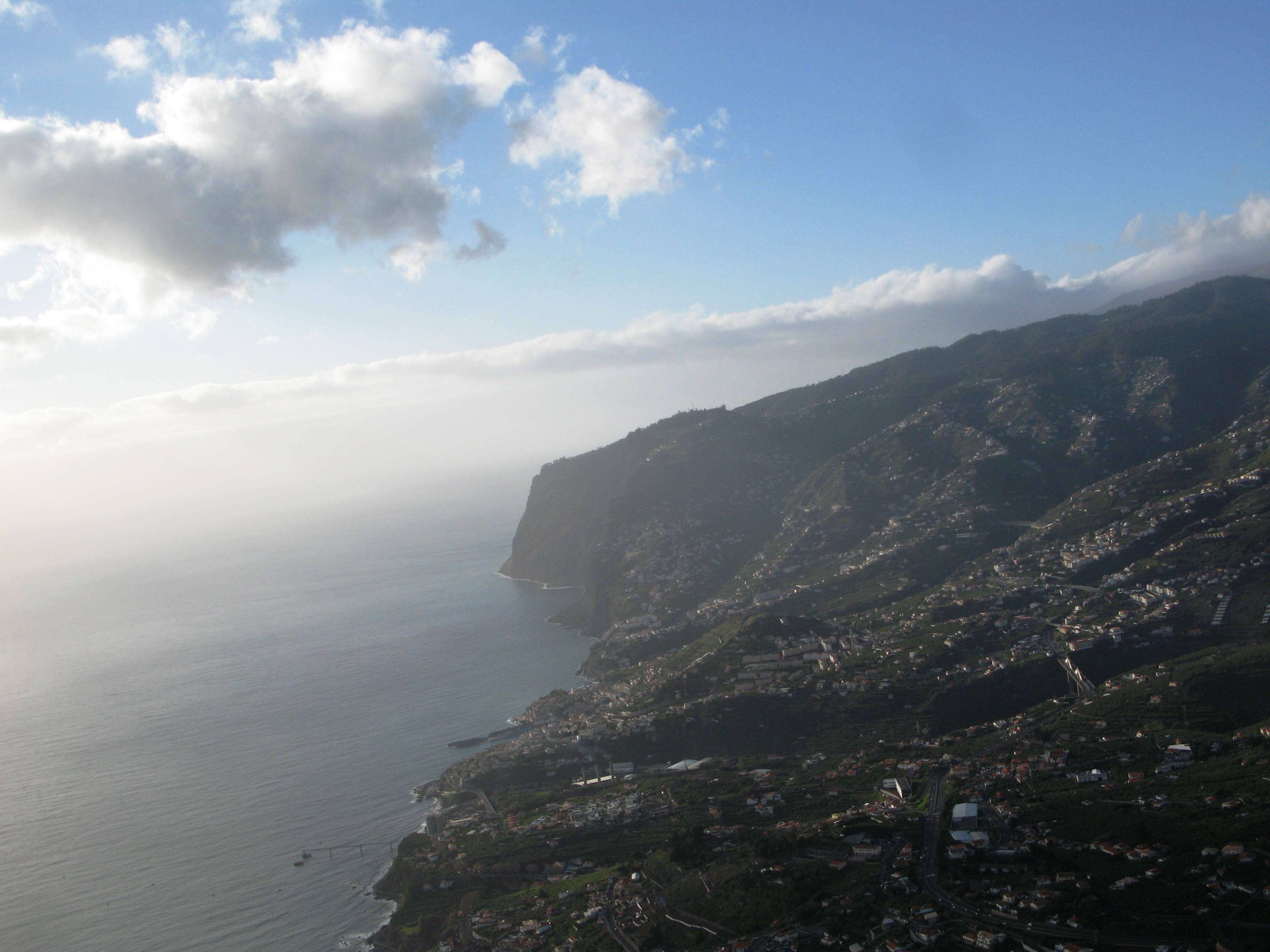 Aerial view from São Martinho towards Cabo Girão - Madeira